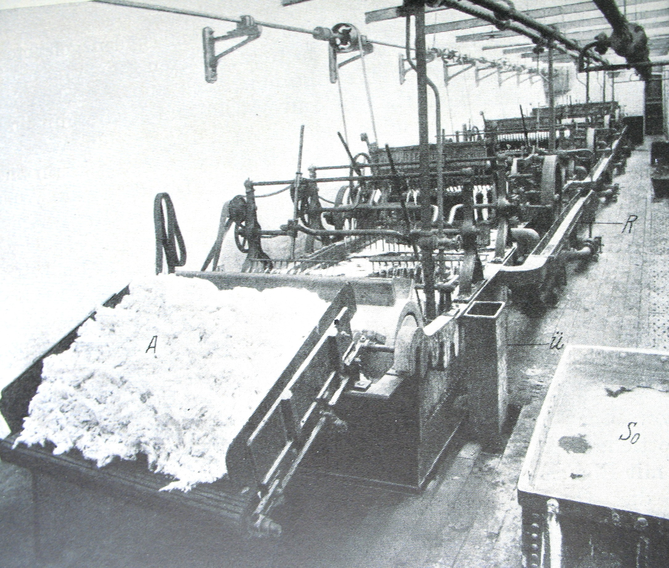 Wollwaschmaschine Leviathan